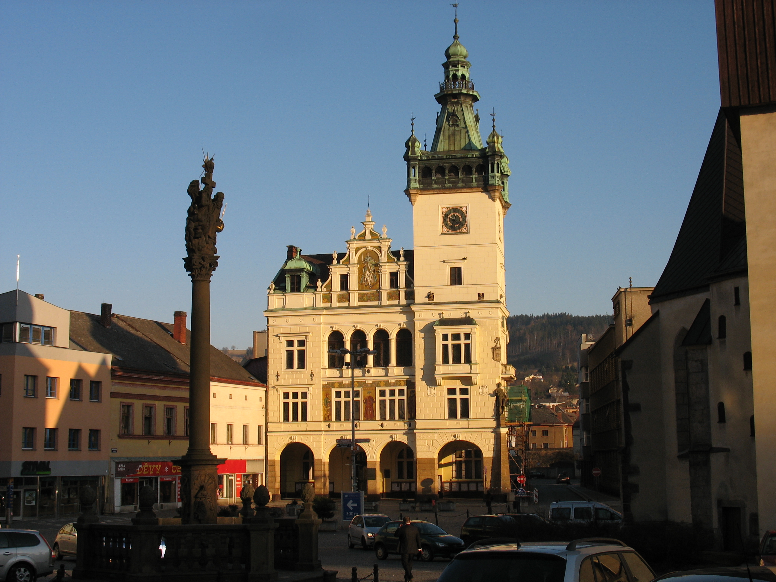 Náměstí v Náchodě s radnicí a morovým sloupem. Foto: O. Mejsnar